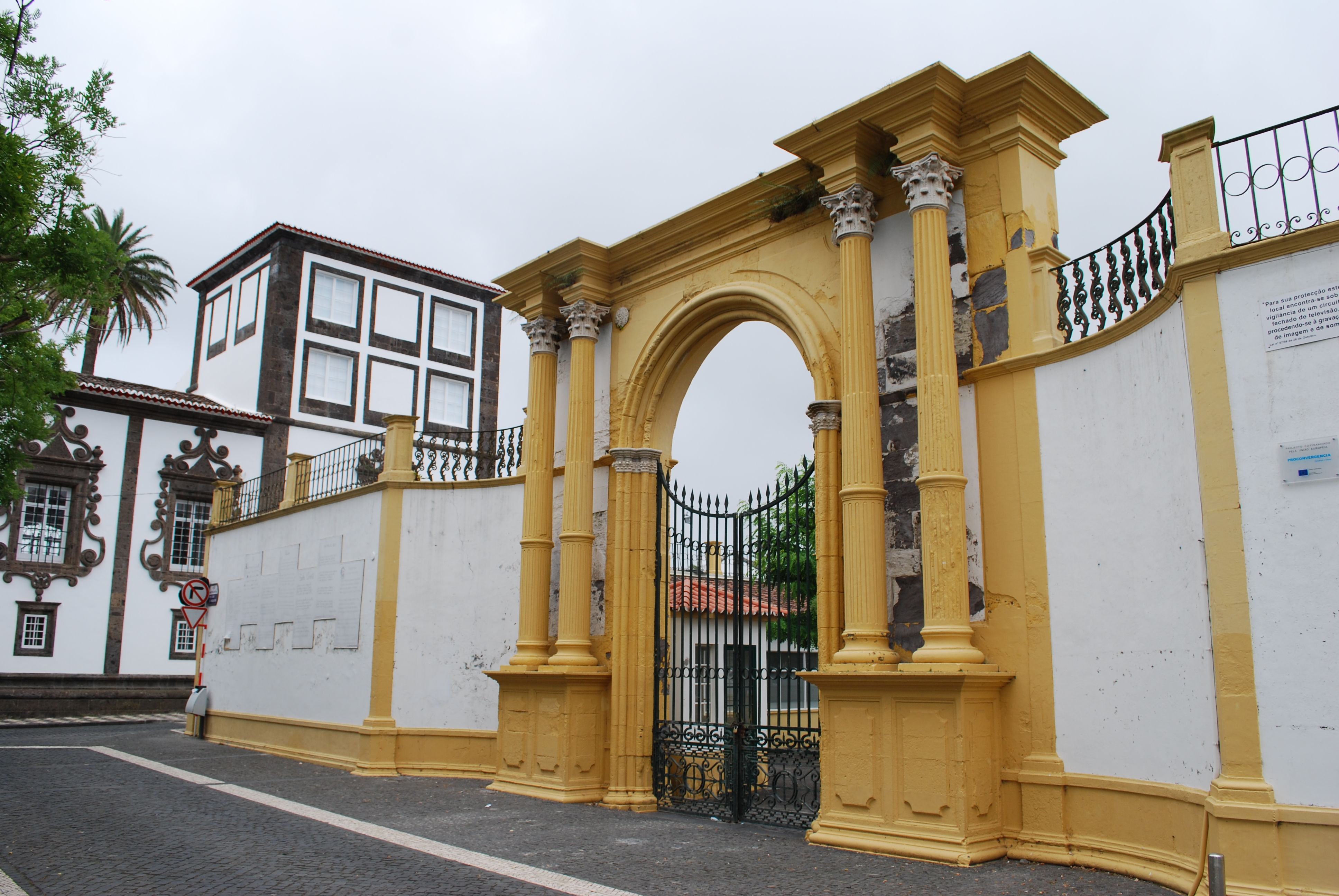 Entrada do Palácio de Fonte Bela (actual Escola Secundária Antero de Quental) em Ponta Delgada